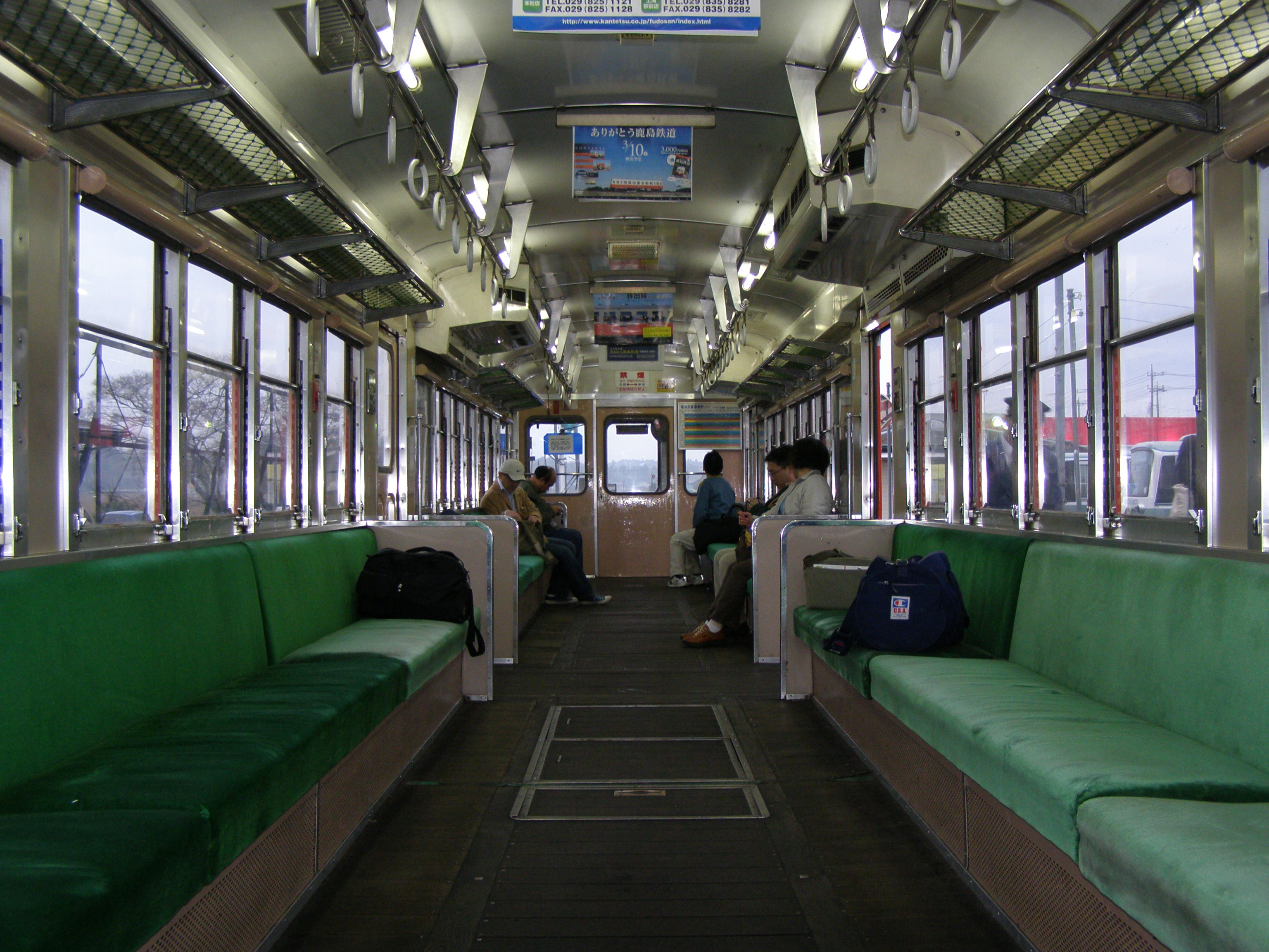 キハ600形602号の車内